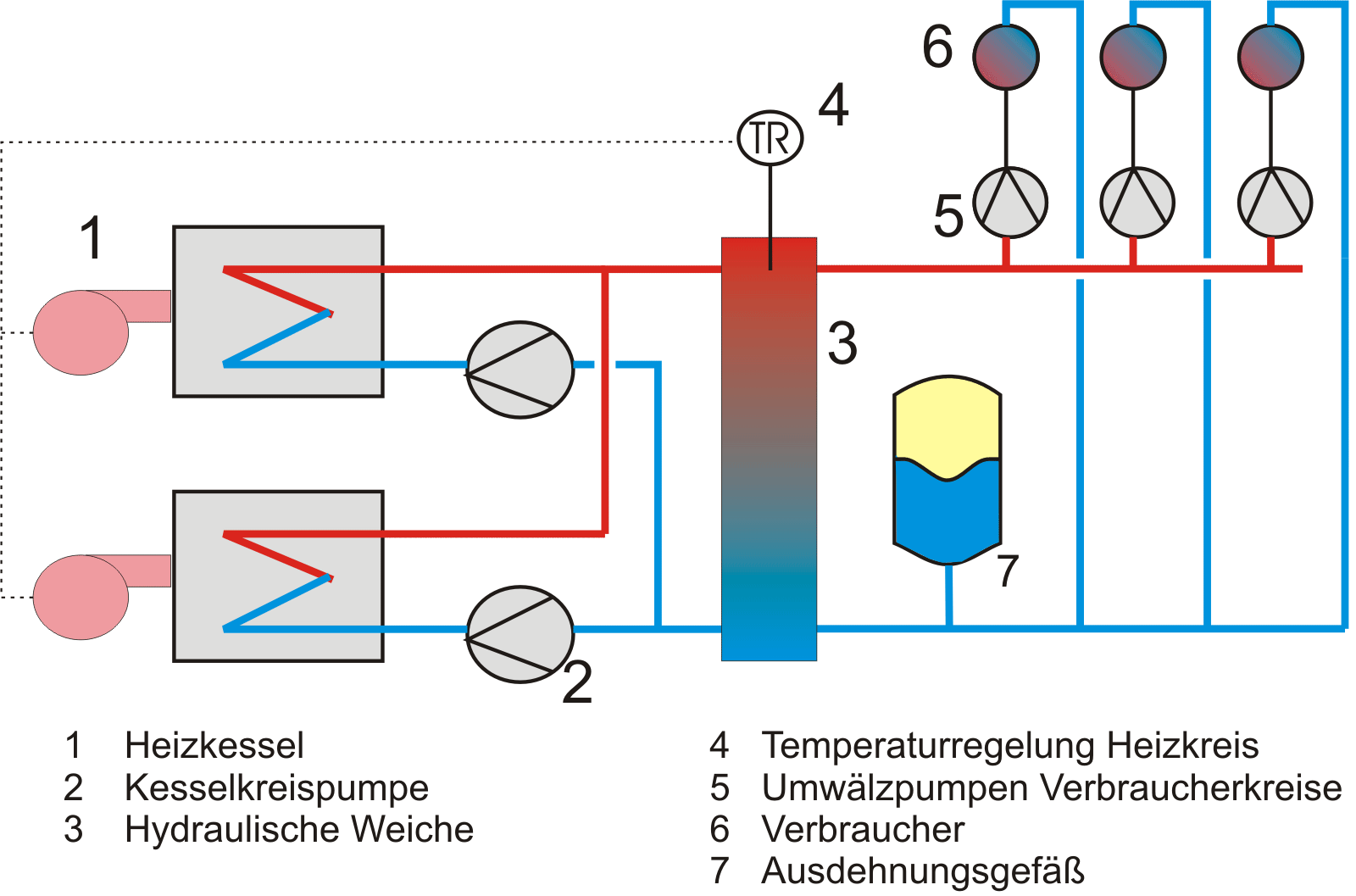 Hydraulische Weiche in einer Heizungsanlage